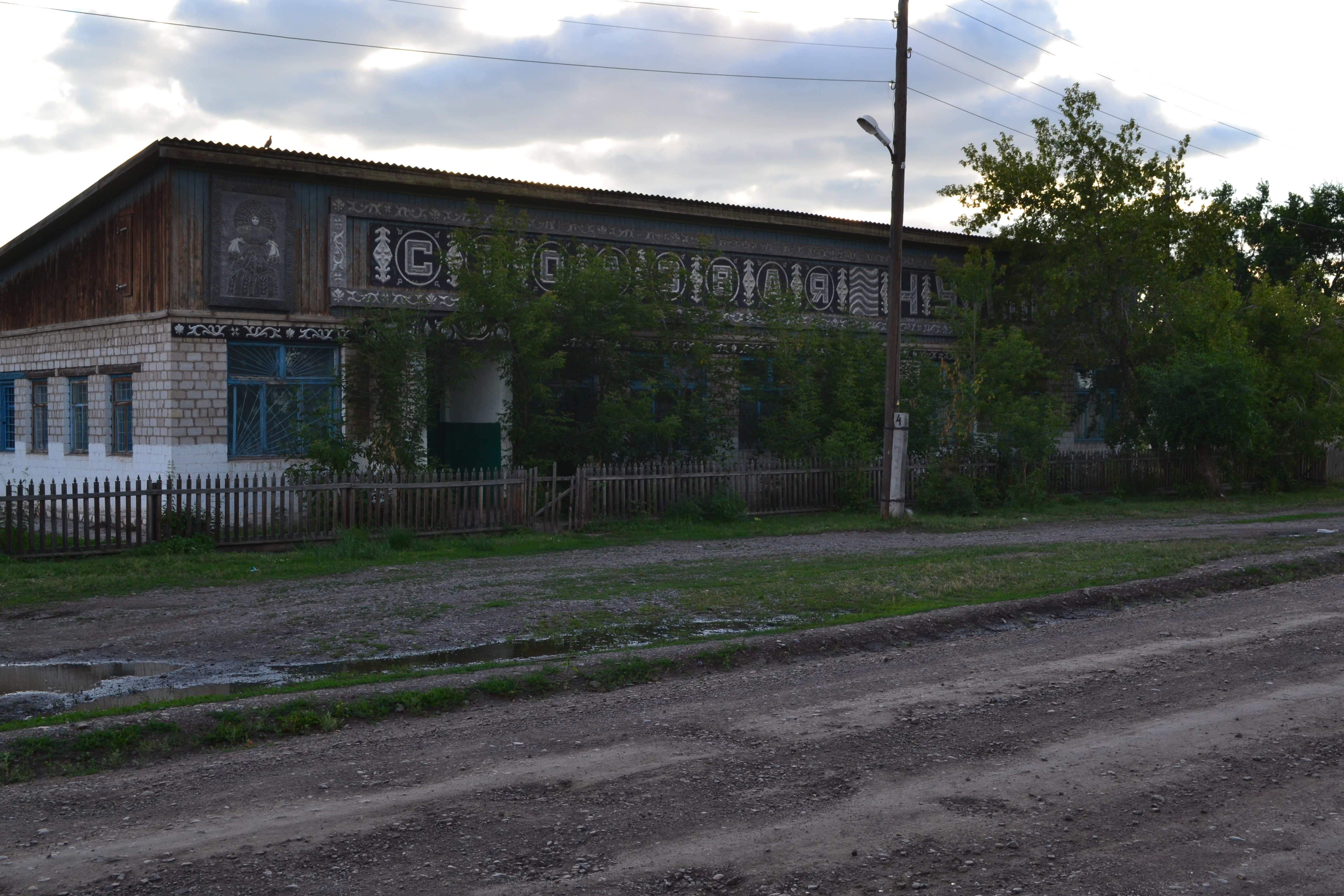 Раньше здесь располагалась столовая, ныне здесь пекарня